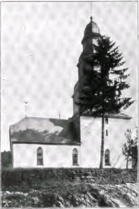 Kirche Fischelbach aus: Die Bau- und Kunstdenkmäler von Westfalen: Band 12: Kreis Siegen. Münster i.W.: Schöningh, 1903